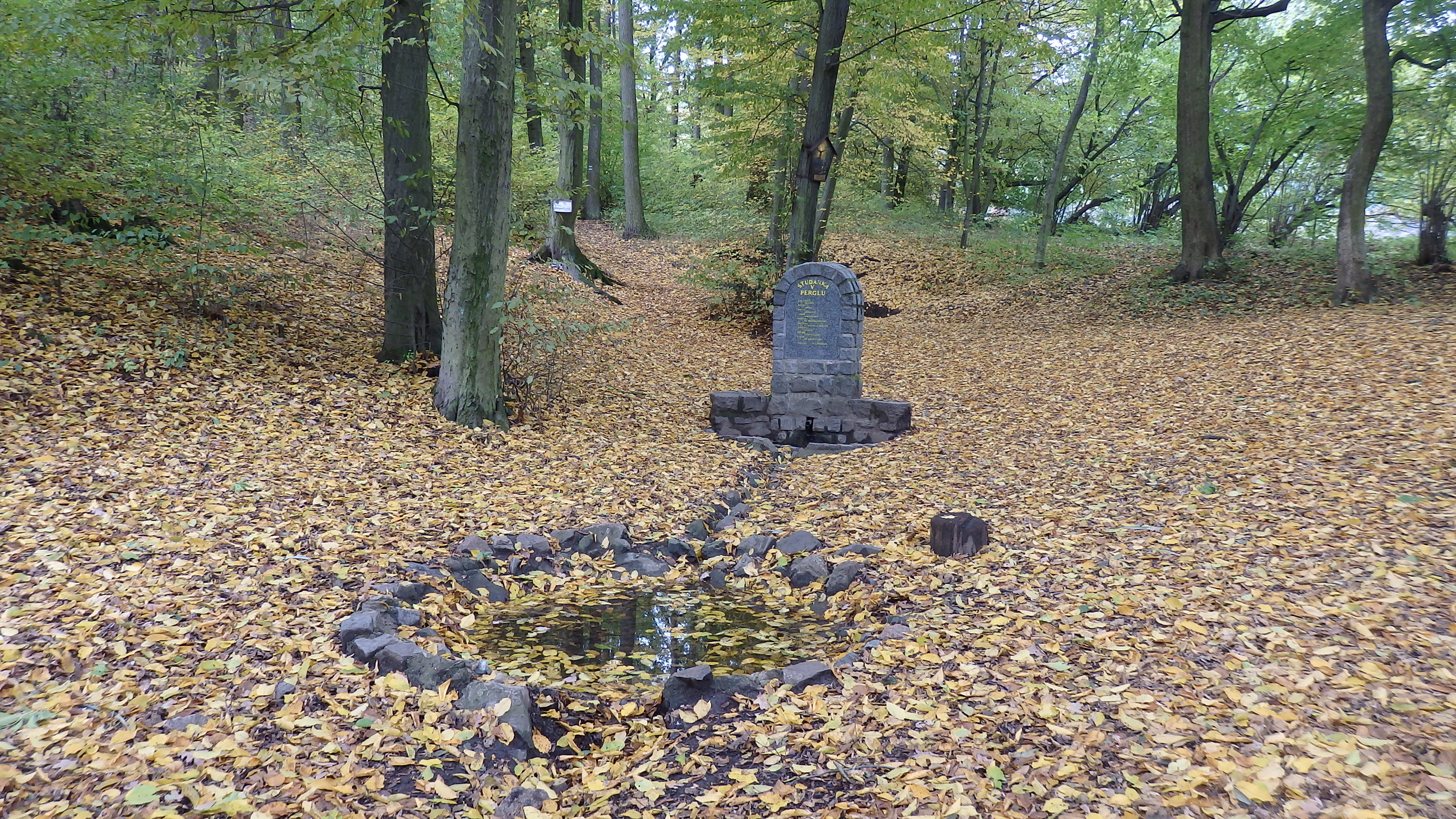 Medlánecká naučná stezka, Brno-Medlánky, studánka v Perglu